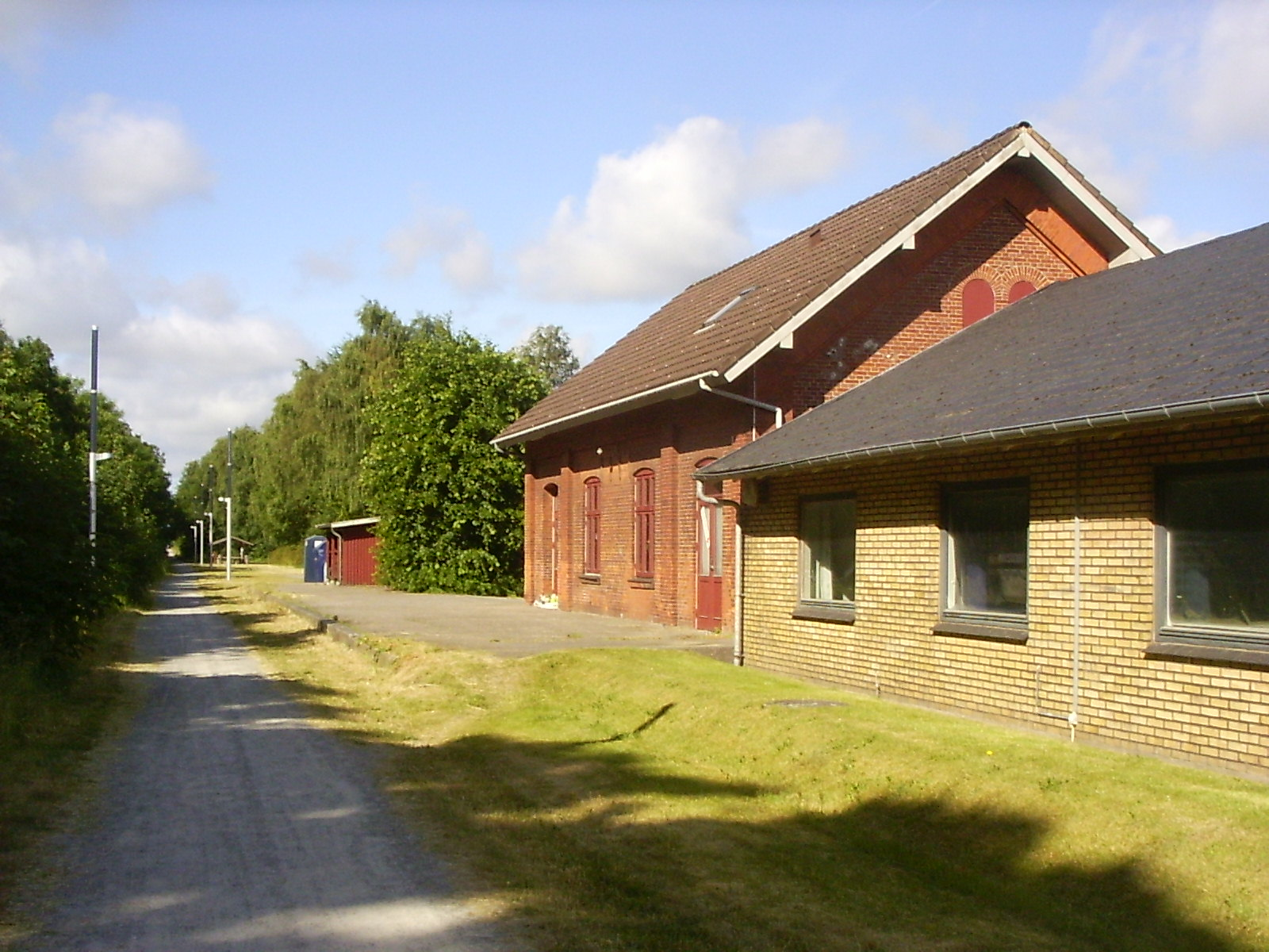 Møldrup Station met schuilhut op de achtergrond